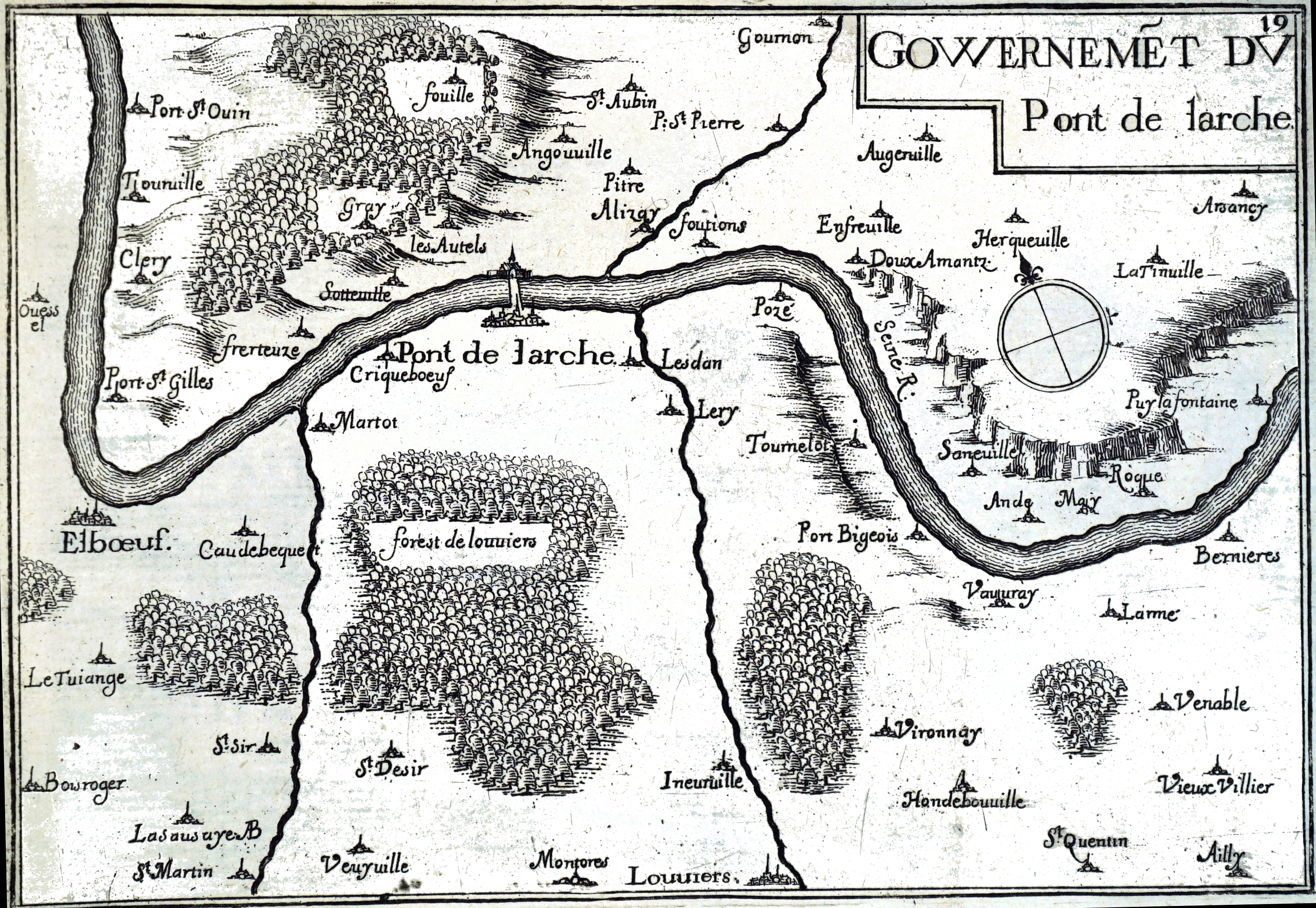 dessin de Tassin dans Plans et profils...'.